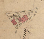 Vallcrosa de Dalt en el Cadastre napoleònic del 1812 (Arxius Departamentals dels Pirineus Orientals)